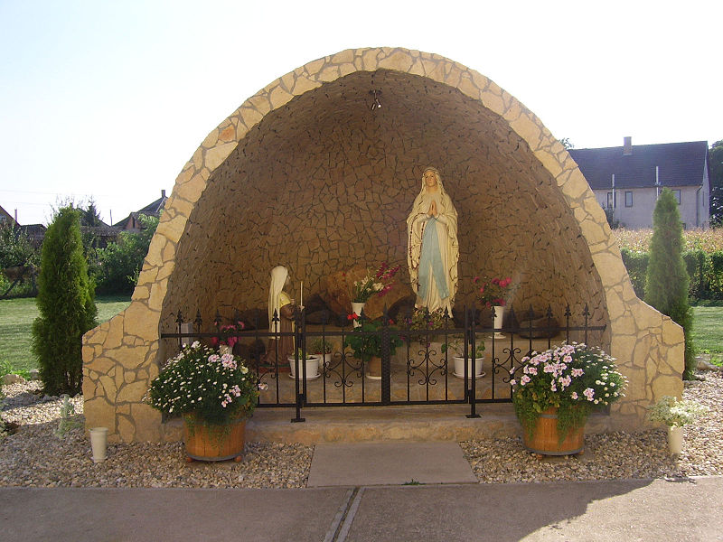 [A felújított lourdes-i barlang a római katolikus templomkertben Balkányban